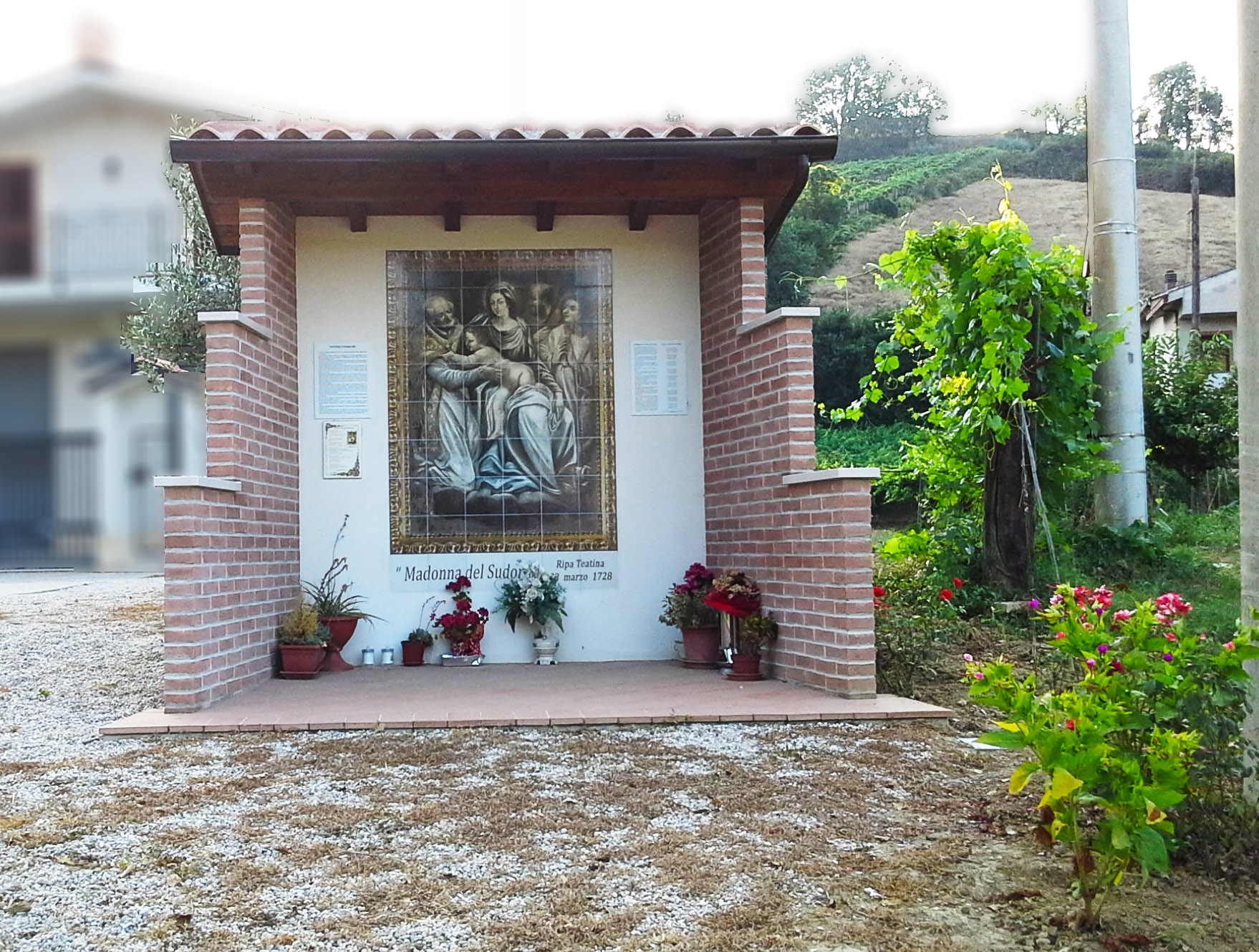 Edicola Votiva voluta dai cittadini di Ripa Teatina, è situata in contrada Alento. Custodisce al suo interno una replica su terracotta del quadro della “Madonna del Sudore”, Patrona del paese. In questo luogo il 22 marzo 1728 avvenne un evento miracoloso, la Madonna dipinta nel quadro, oggi esposto nella chiesa principale, sudò sangue dalla fronte.